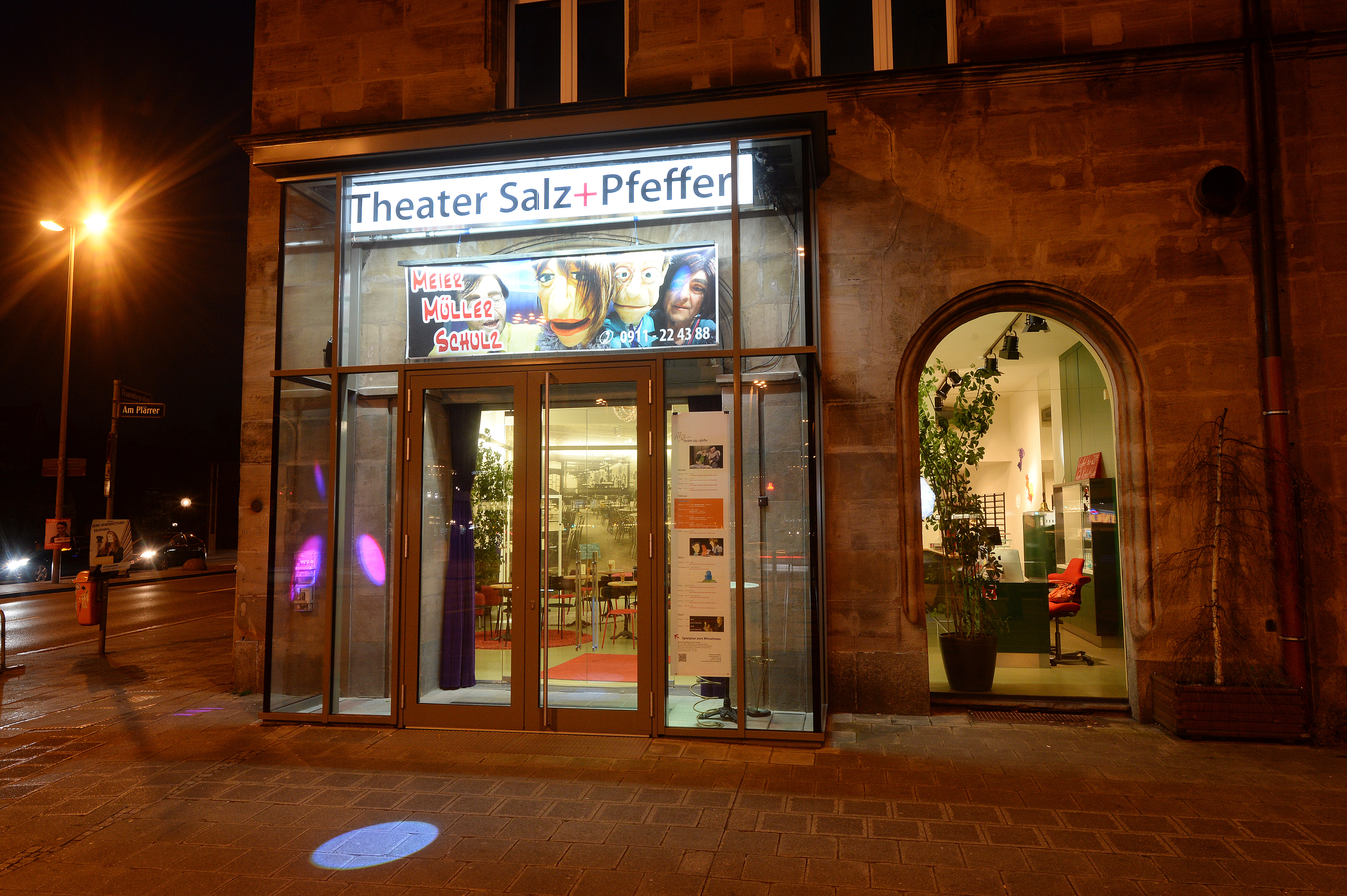 Das Theater Salz+Pfeffer von Außen